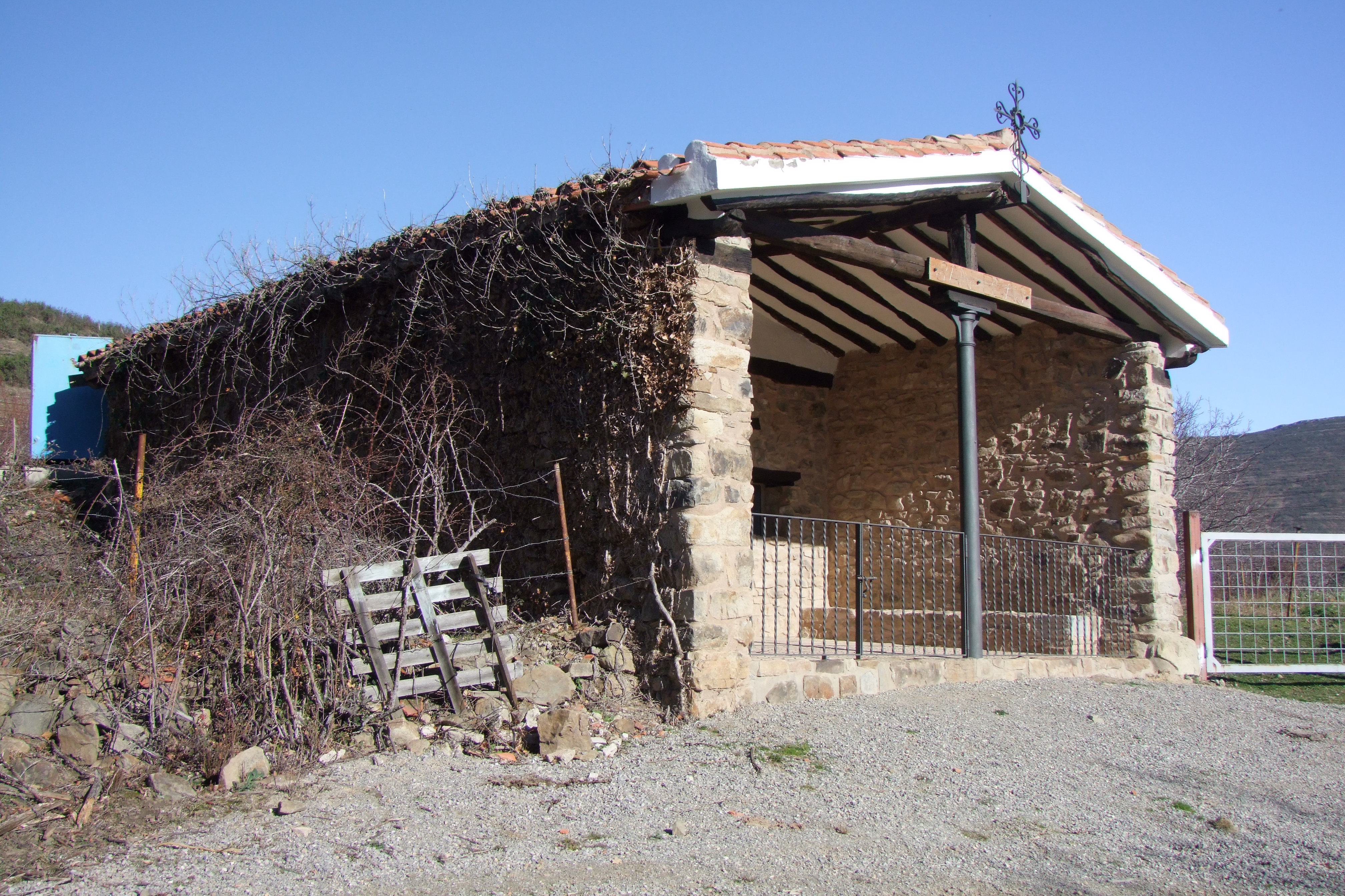 Ermita de San Blas en la localidad de Treguajantes, La Rioja - España